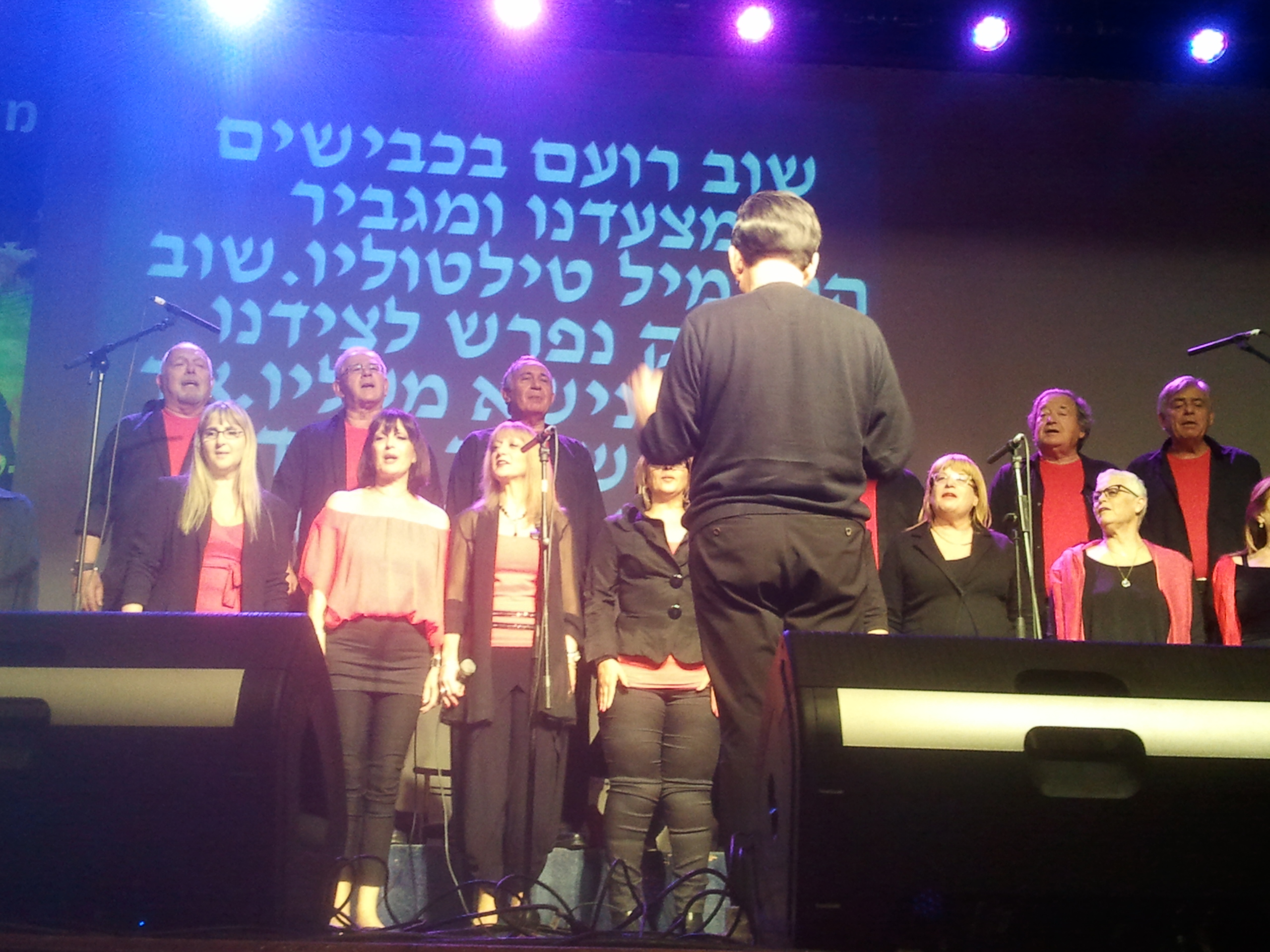 אפי נצר במופע של שרה'לה שרון מועדון הזמר של עמק הירדן